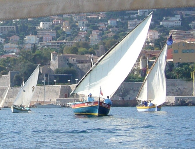 "Resquilhada", rassemblement de pointus français et italiens organisé chaque automne en rade de Villefranche-sur-Mer